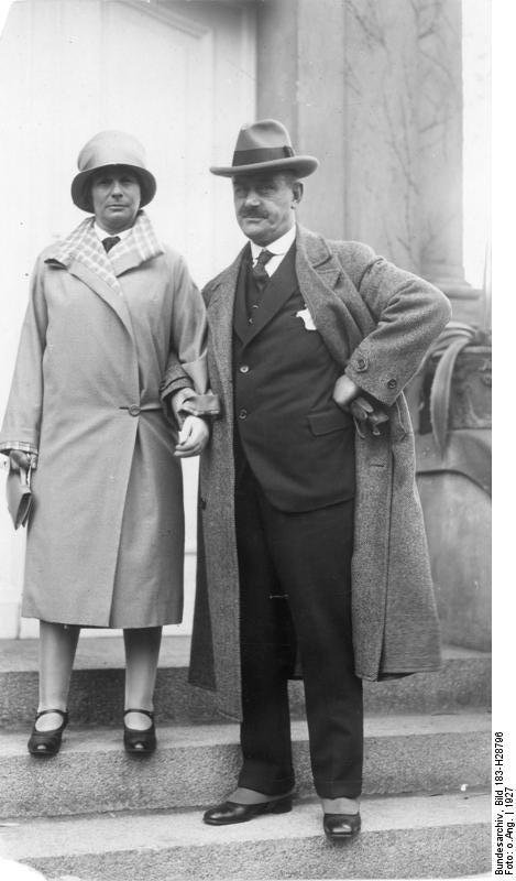 Zentralbild Thomas Mann, bürgerlich-humanistischer Schriftsteller von Weltgeltung. geb.: 6.6.1875 in Lübeck gest.: 12.8.1955 Kilchberg (Schweiz) 1929 erhielt er den Nobelpreis. UBz.: Thomas Mann und Gattin Aufnahme: 1927 31 103-27 [Scherl Bilderdienst]